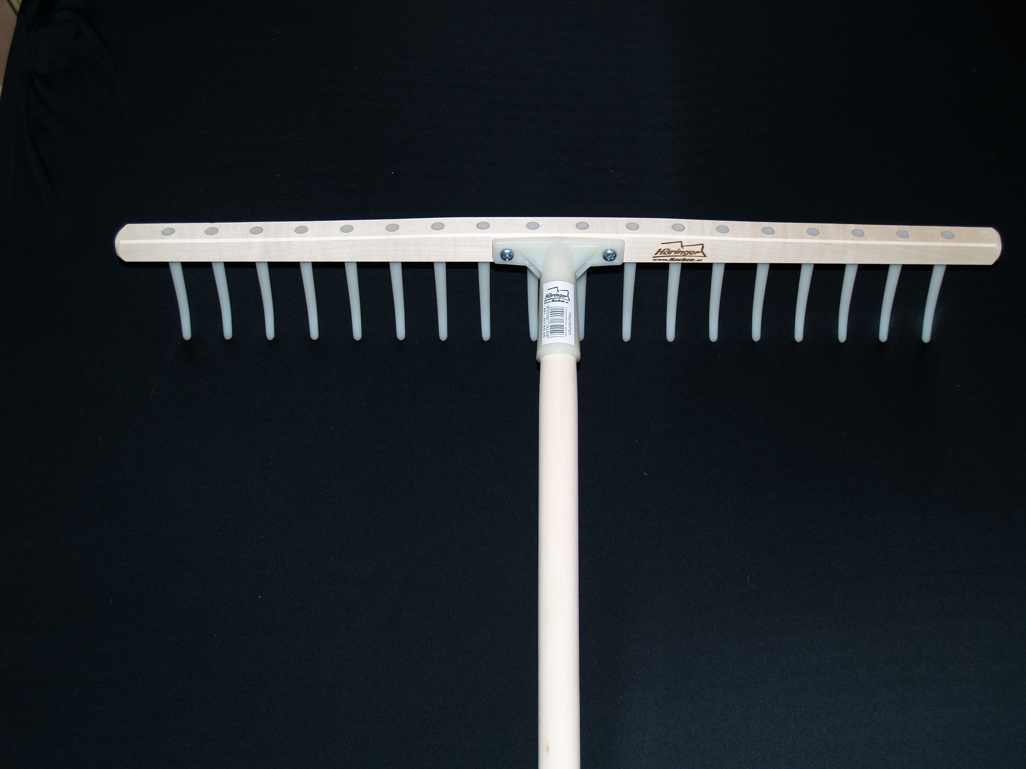 Heurechen der Firma Häringer Rechen aus Tirol